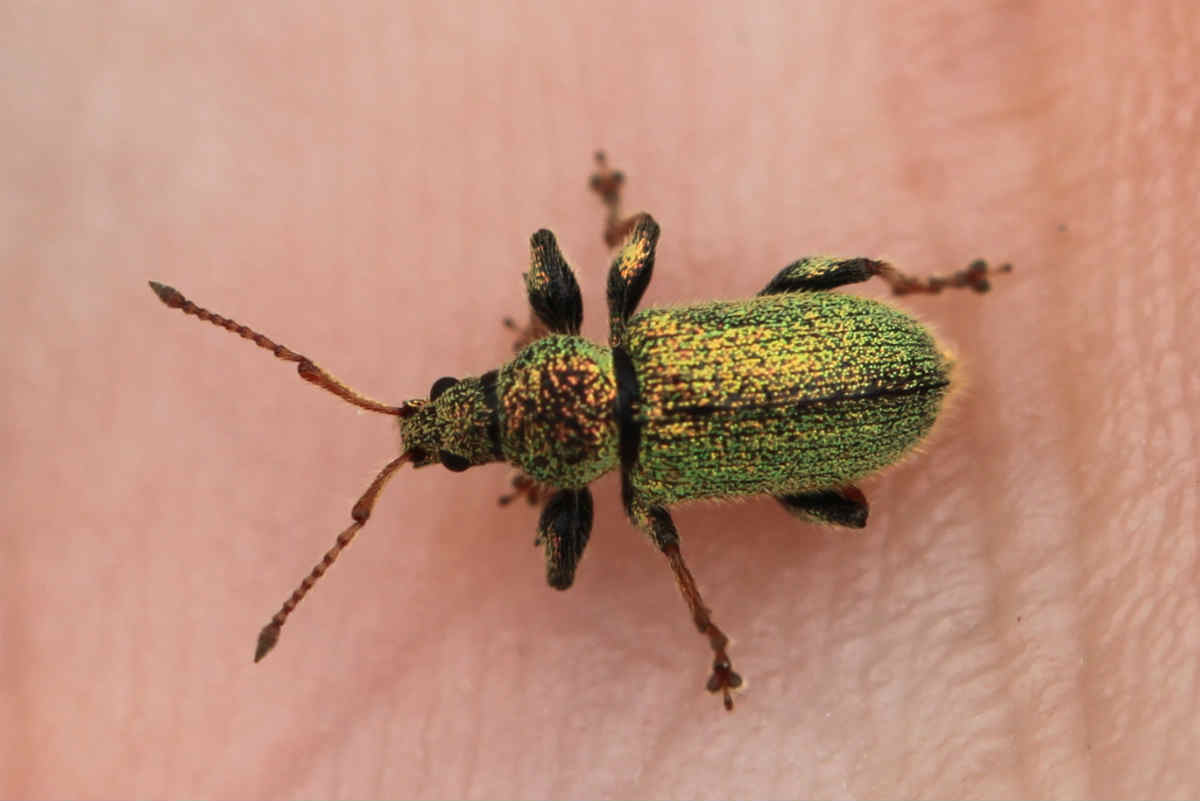 Phyllobius betulinus am 3.5.2017 in Walldorf/Baden